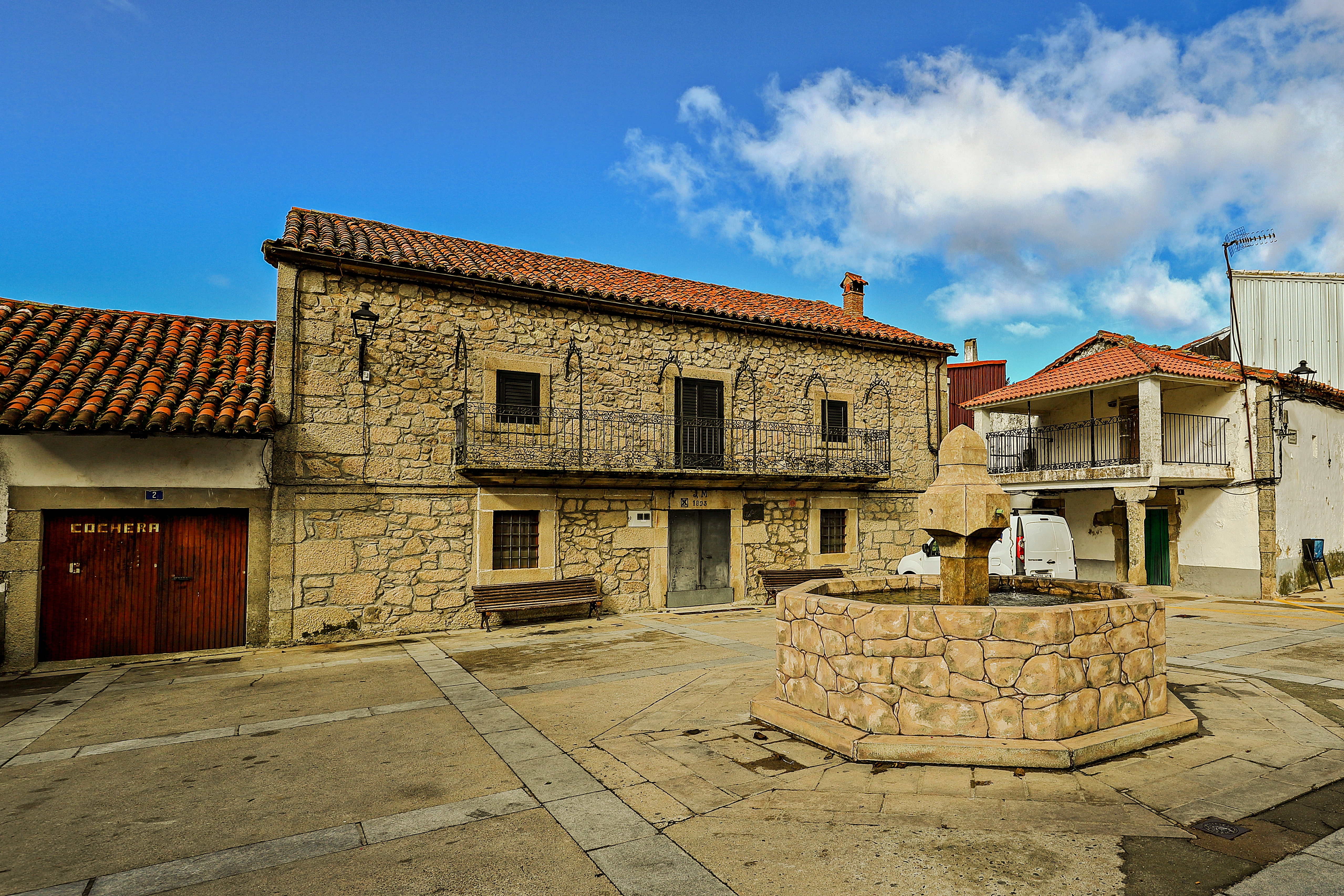 Cabezabellosa es un municipio de la comarca de Trasierra en la provincia de Cáceres.